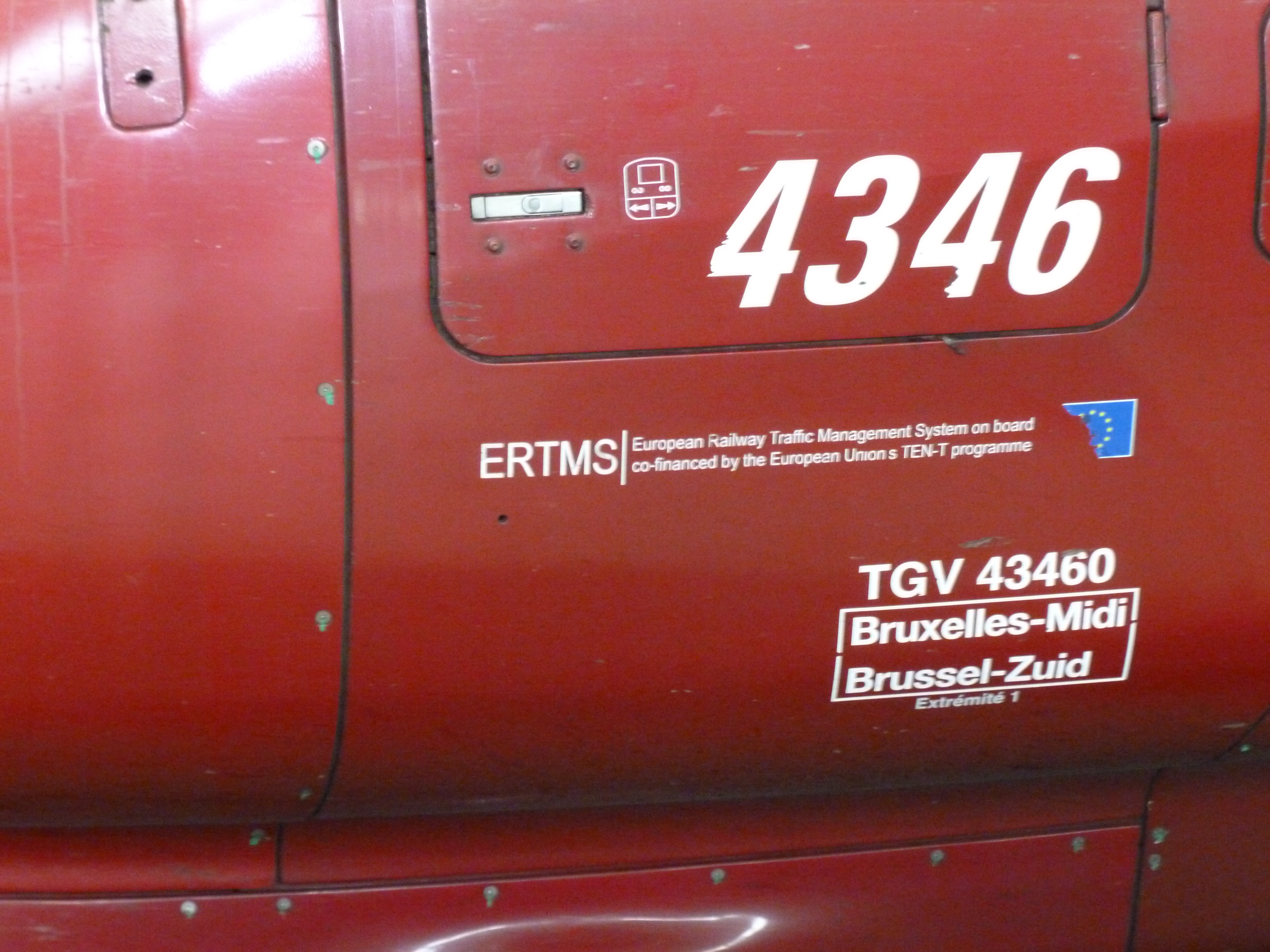 Inscription présente sur les Thalys équipé de l'ERTMS expliquant succinctement le financement du systéme.